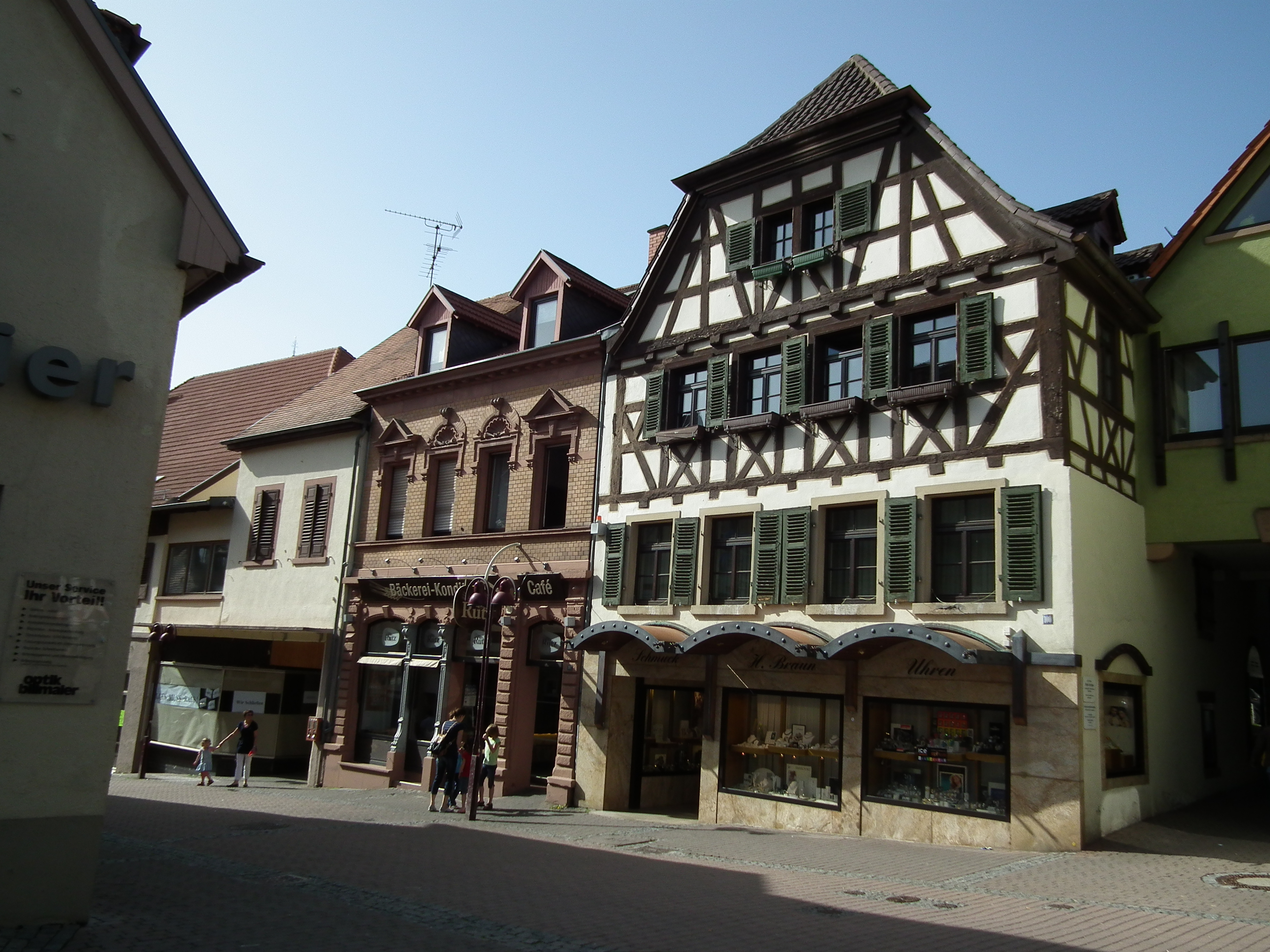 Gebäude in der Wieslocher Altstadt (Baden-Württemberg, Deutschland)